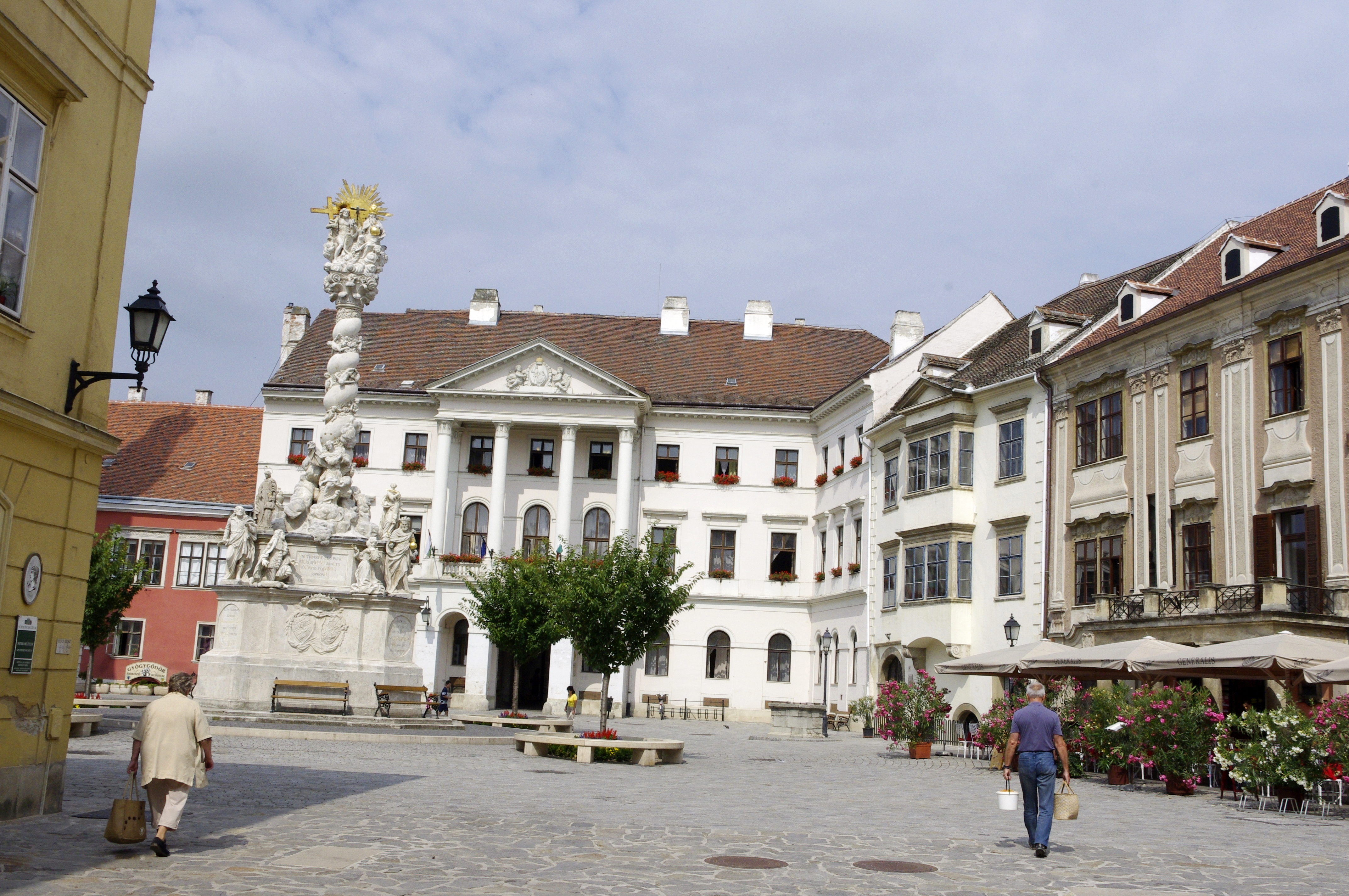 Sopron, Ungarn - Hauptplatz (Fö tér), Dreifaltigkeitssäule und dahinter Haus Fö tér 5 die ehemalige Stadthalle.